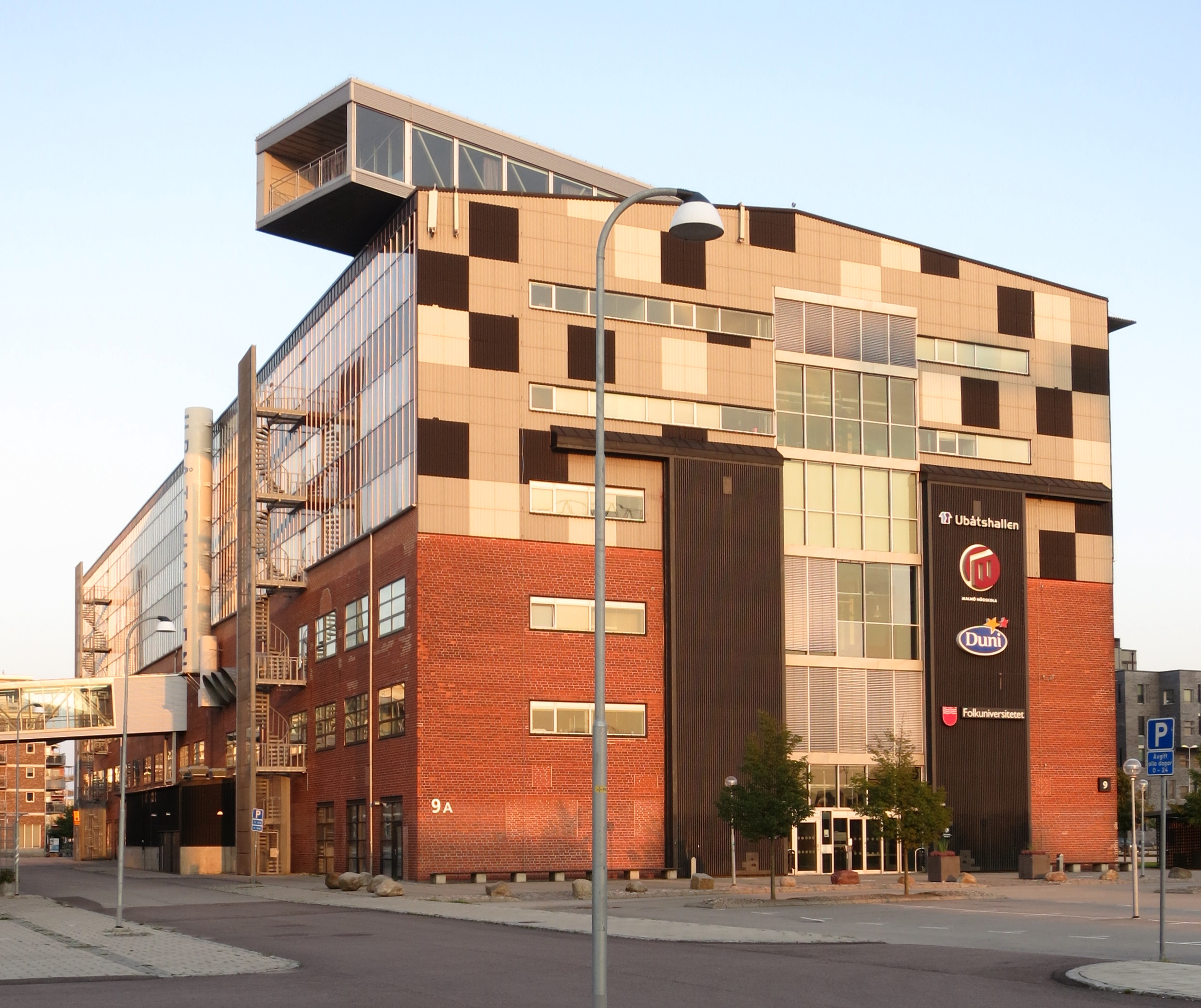 Ubåtshallen i Västra hamnen